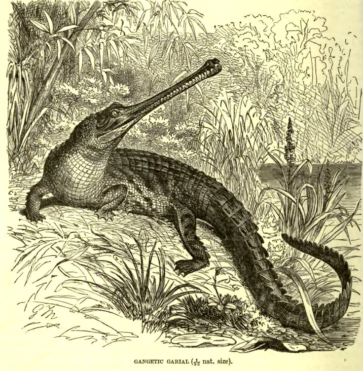 Ganges Gharial